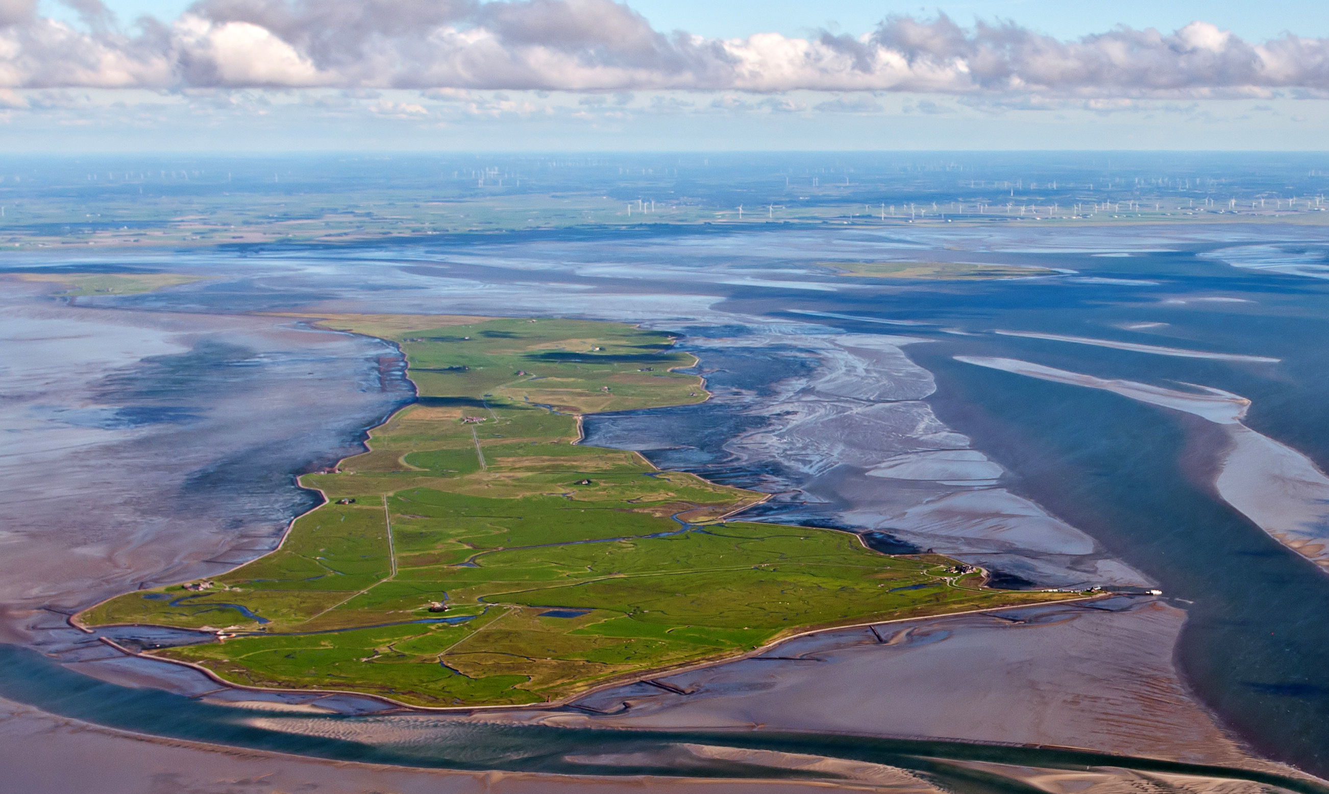 Fotoflug über das nordfriesische Wattenmeer – Langeneß (von W)